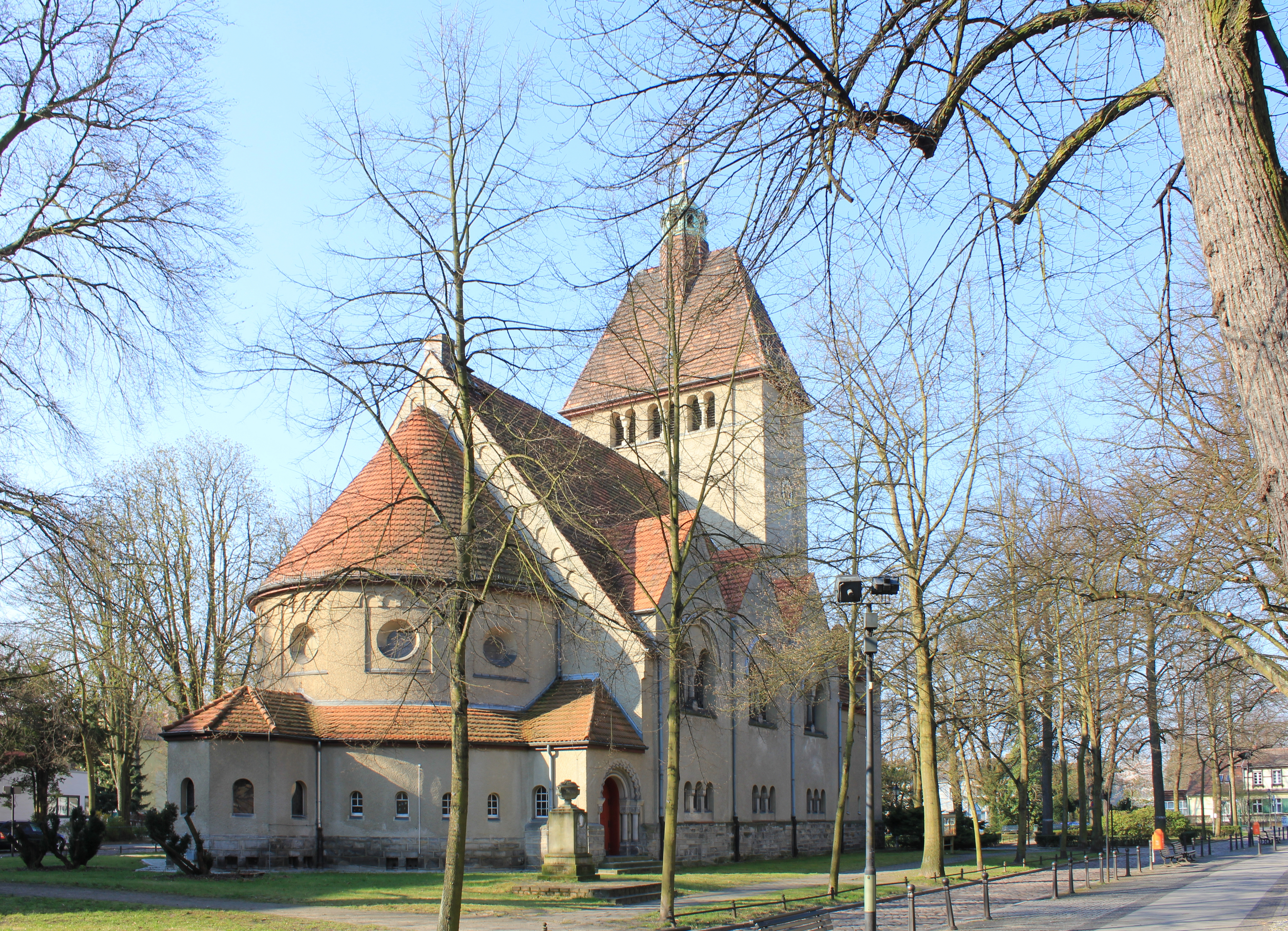 Dorfanger Ev. Kirche Alt-Tegel, 1911-12 von Jürgen Kröger mit Grabmal Wilhelmine Anne Susanne v. Holwede, geb. Colomb, um 1784